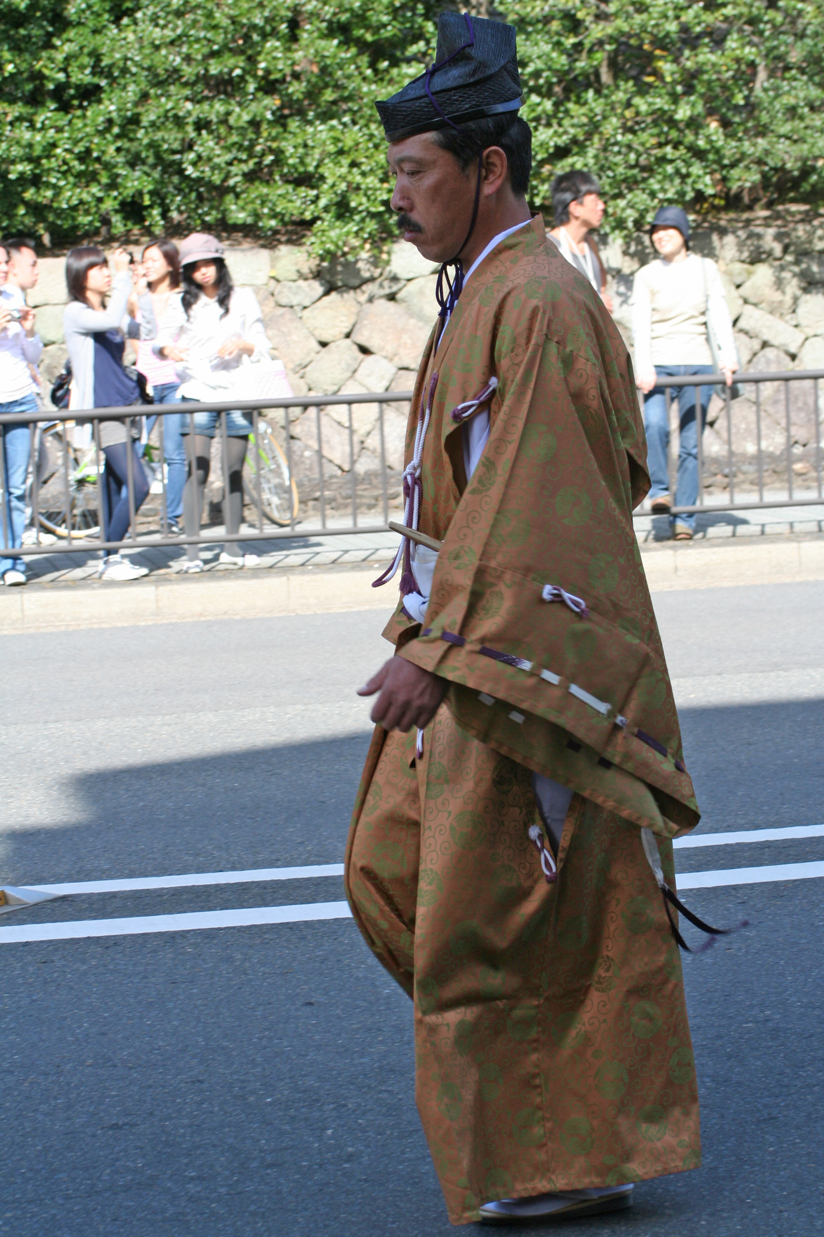 京都府京都市にて開催された時代祭。正午の御所から平安神宮までの行進の様子。2009年10月22日撮影。